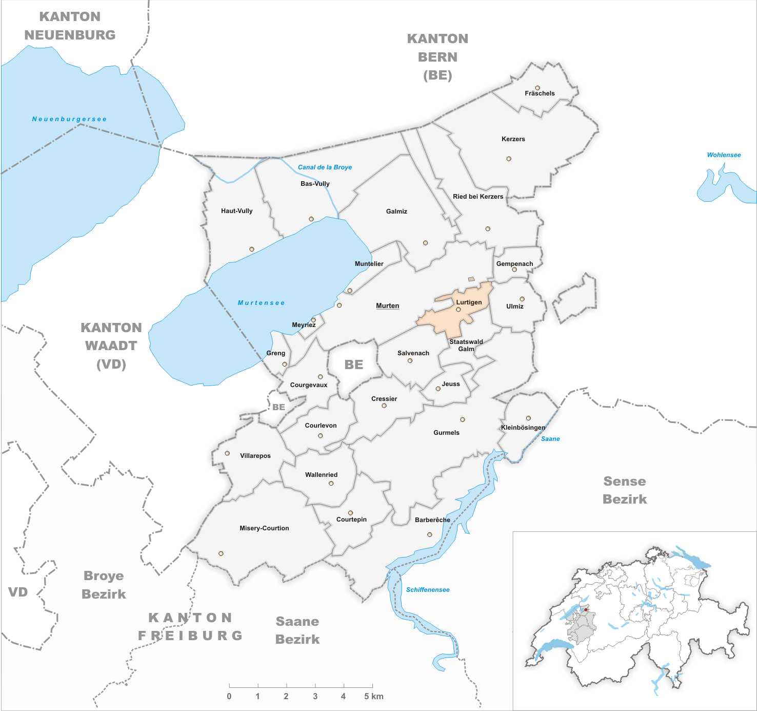 Municipality Lurtigen